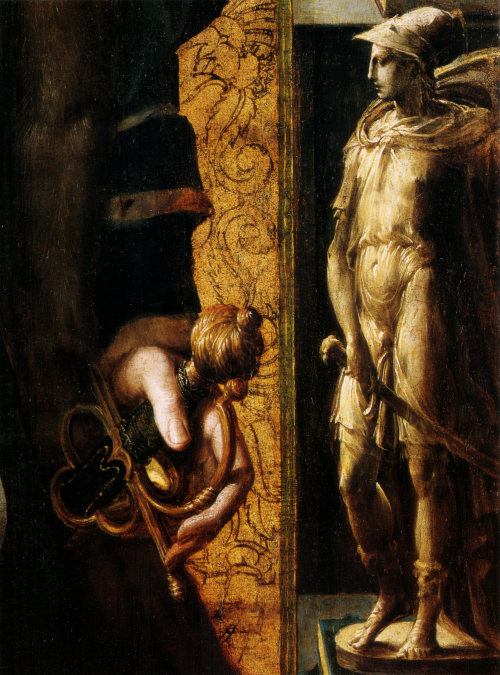 Ritratto di Pier Maria Rossi di Sansecondo (detail)